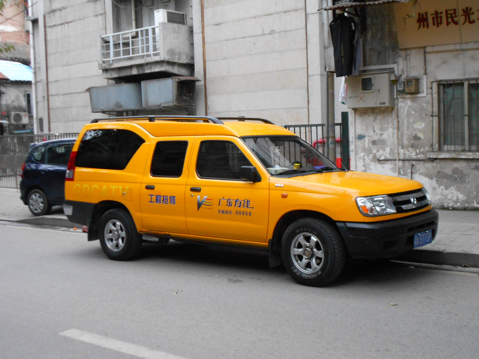 廣東有線電視工程搶修車「粵A-5770P」。